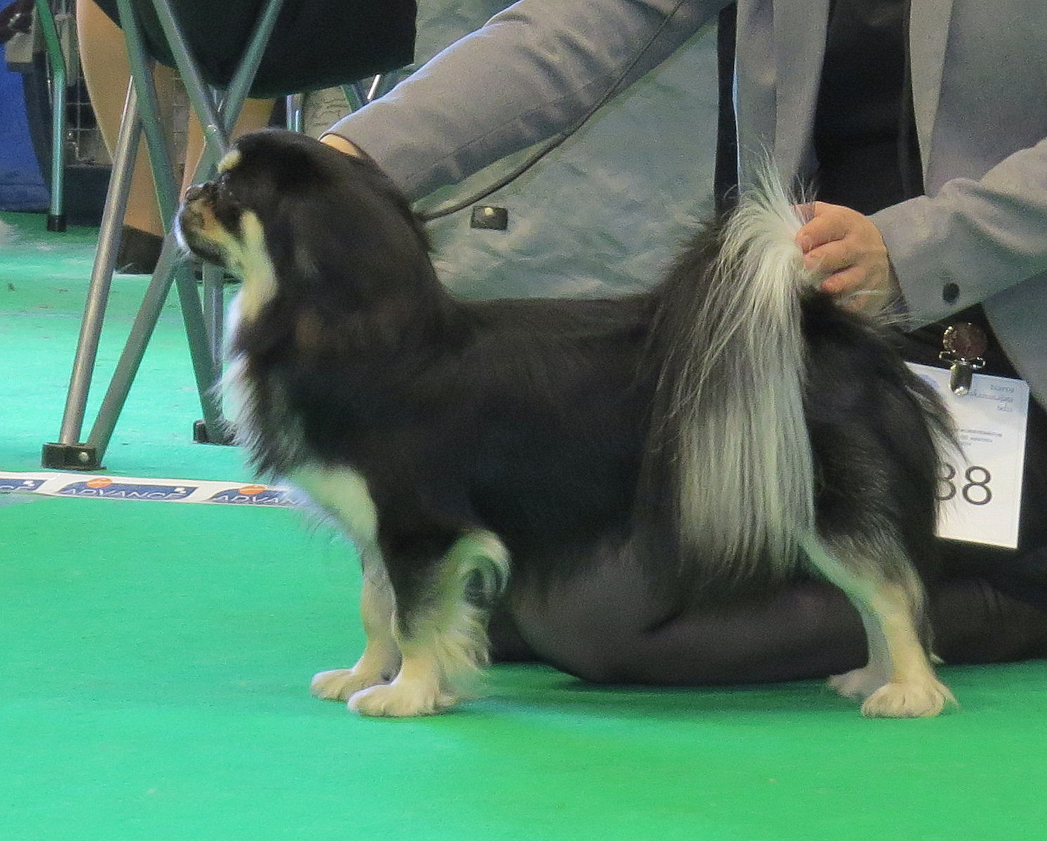 Тибет в Нарве